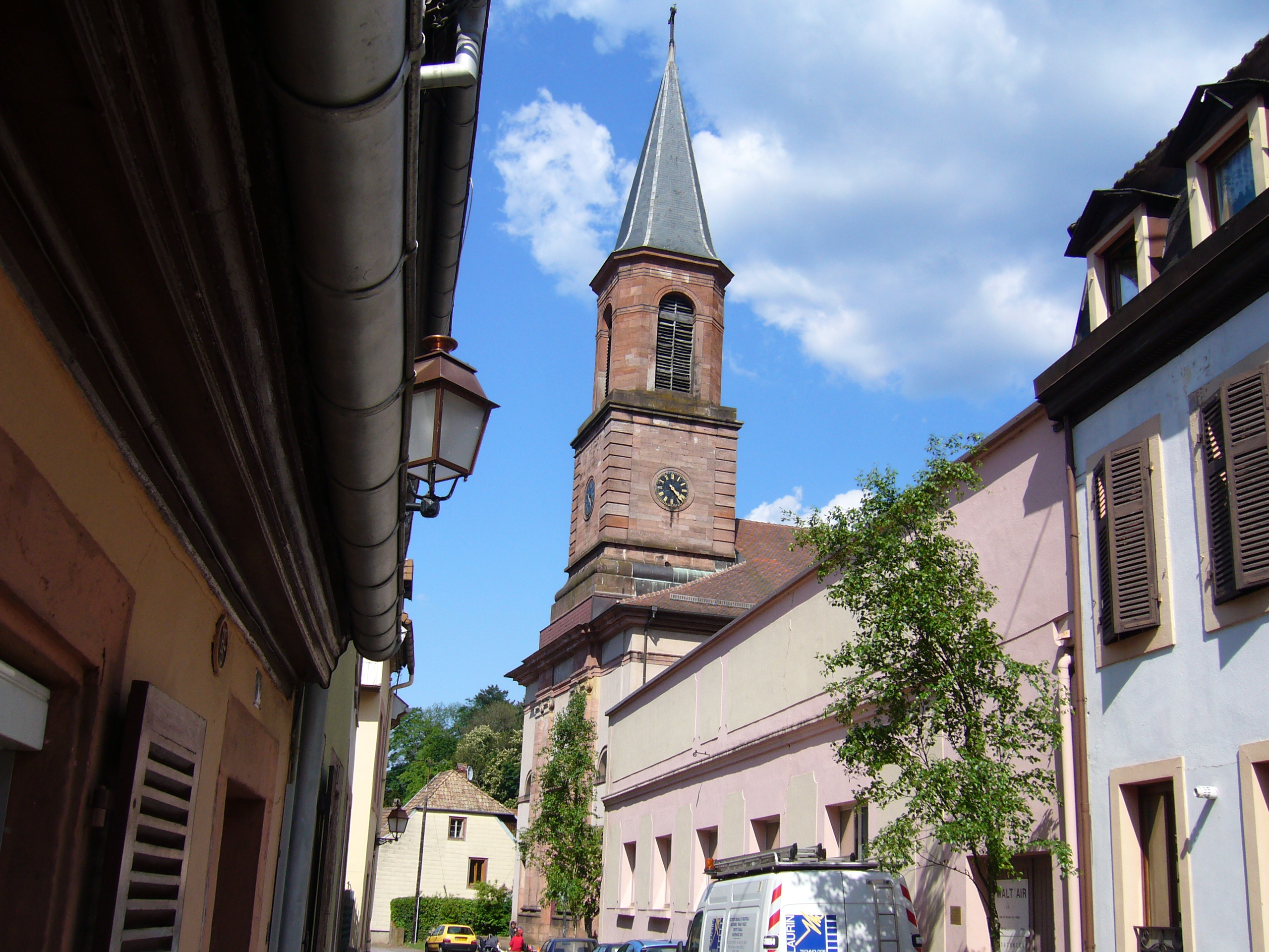 Eglise Saint-Louis de Sainte Marie-aux-Mines